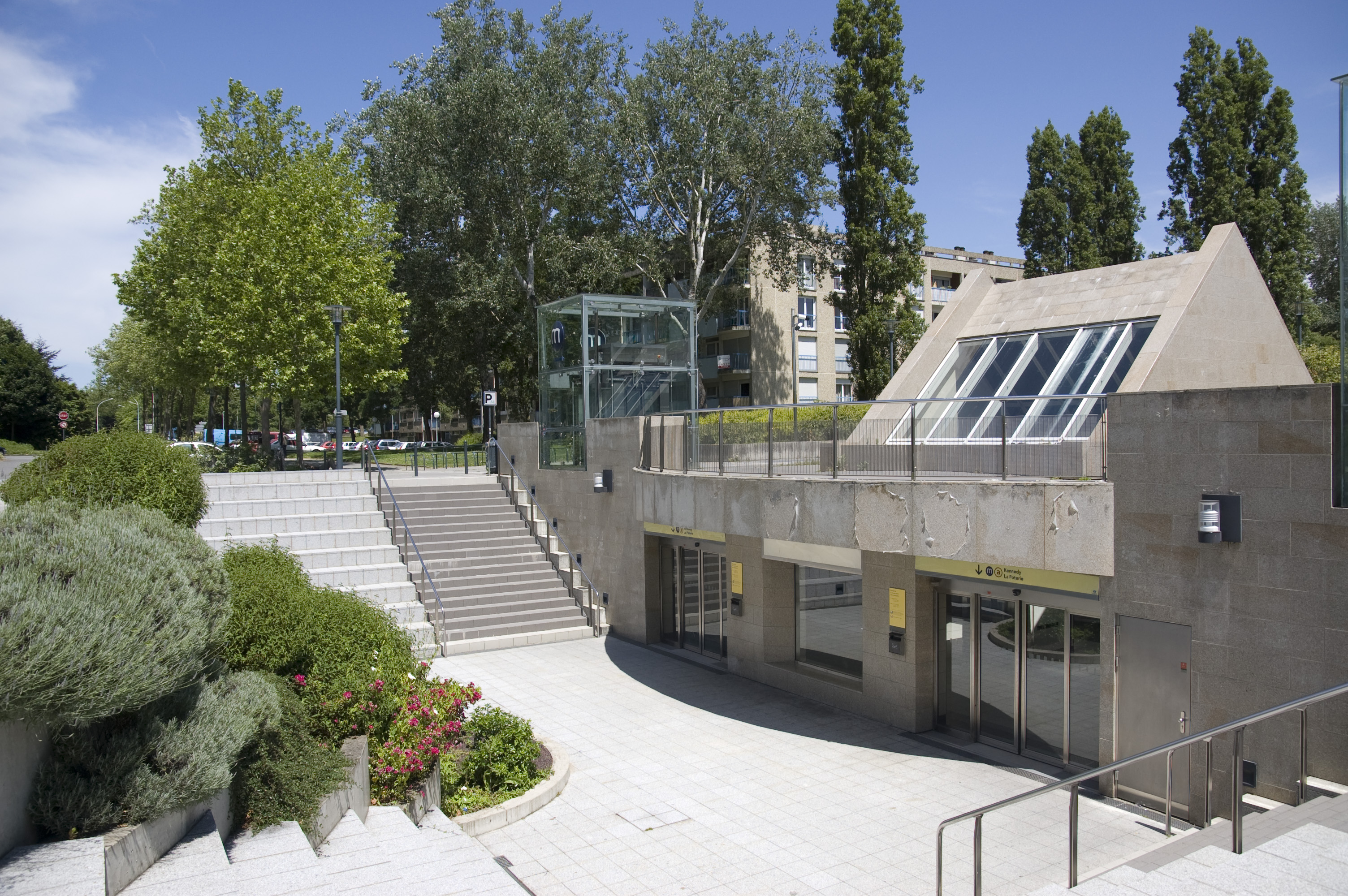 Station de métro Triangle